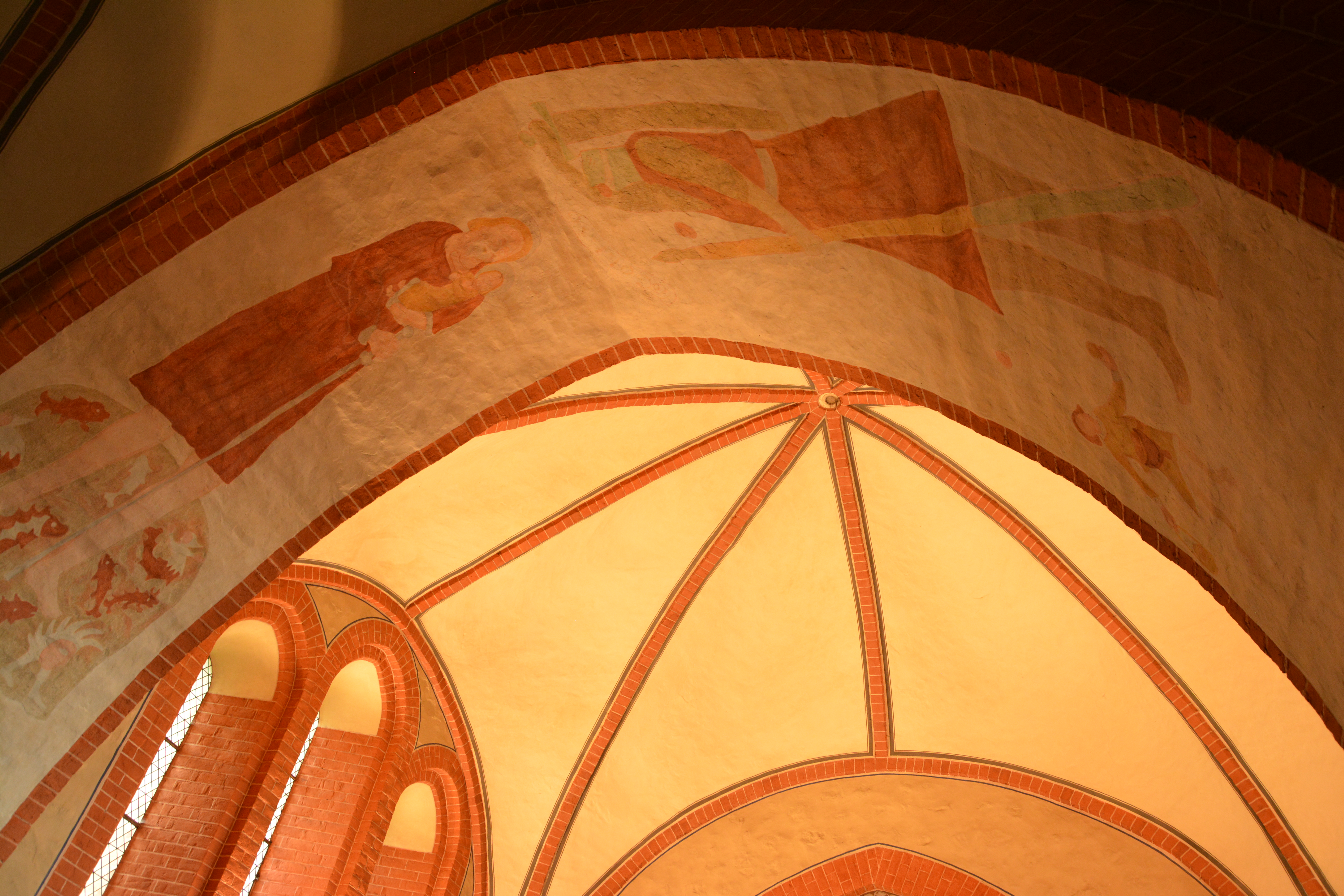 Dorfkirche Lüssow Landkreis Rostock Wandmalereien im westlichen Gurtbogen